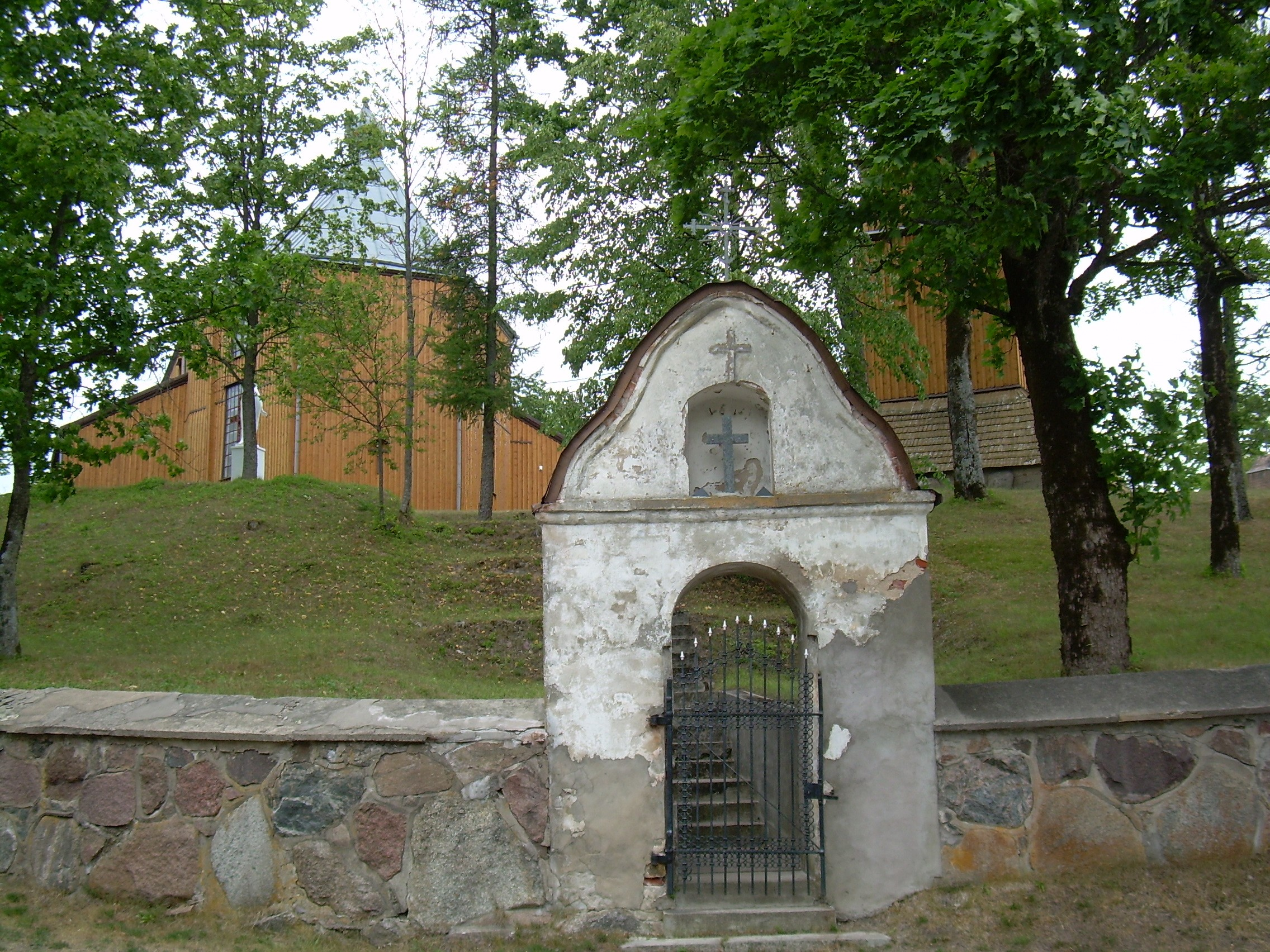 Alsėdžių Švč. Mergelės Marijos Nekaltojo Prasidėjimo bažnyčia